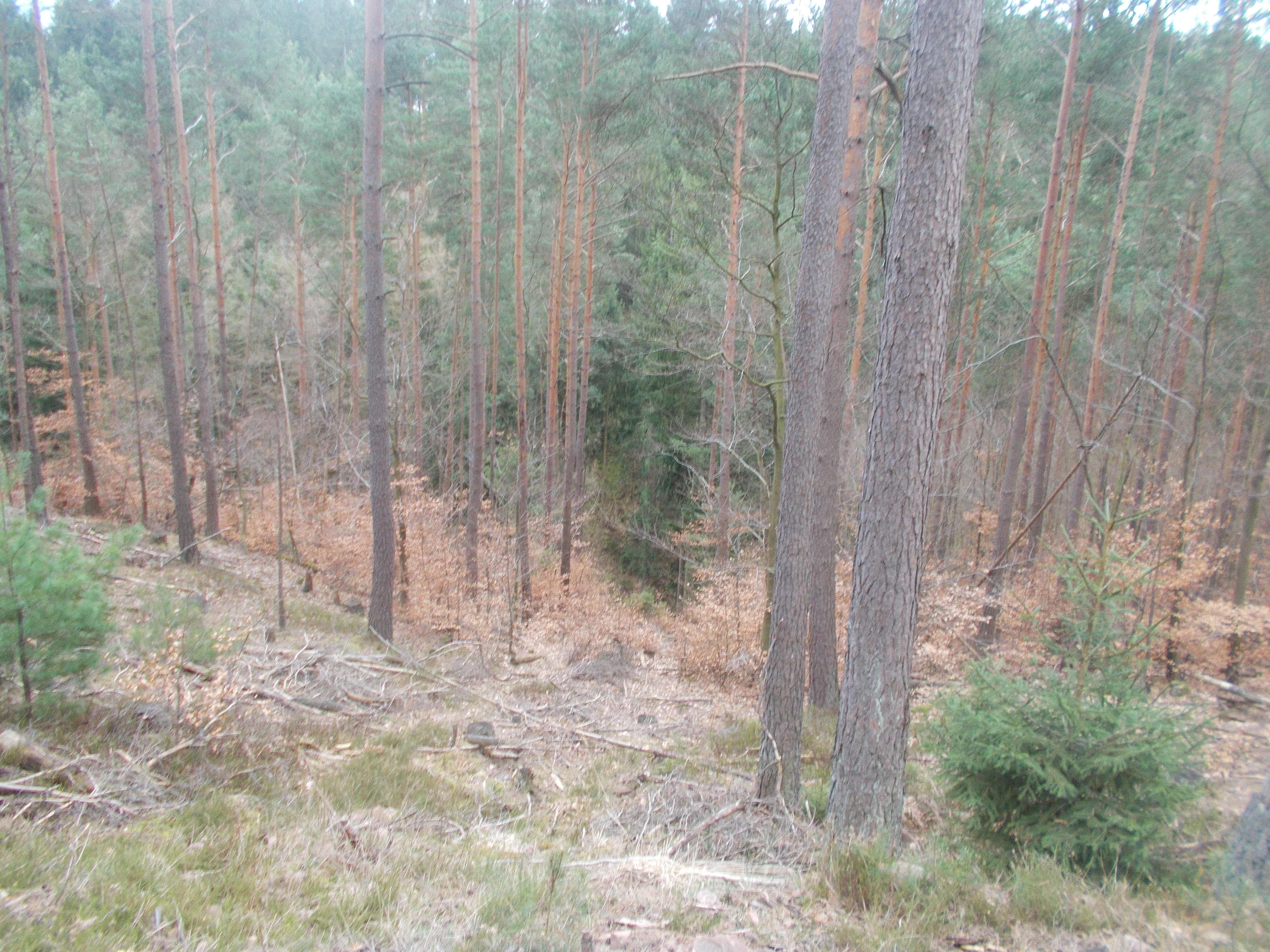 Der Pfälzerwald ist das größte Waldgebiet Mitteleuropas und ist sowohl Naturpark als auch Biosphärenreservat.